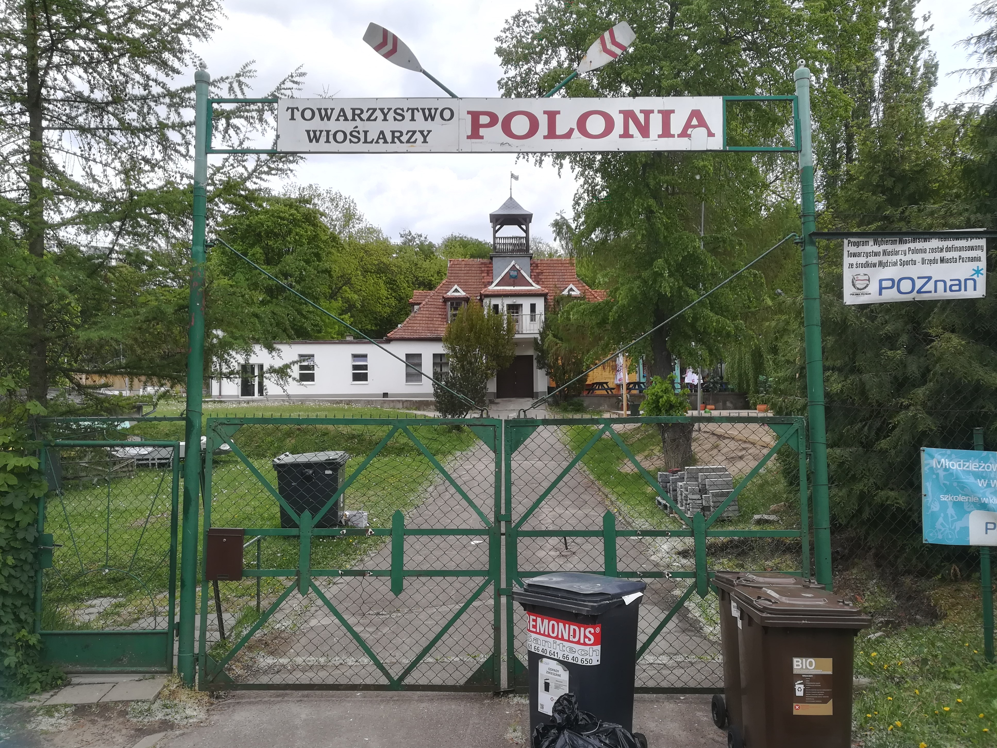 Towarzystwo Wioślarskie Polonia w Poznaniu.